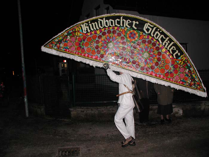 Rindbacher Glöckler (Sturmhut) beim Glöcklerlauf 2005 in Ebensee